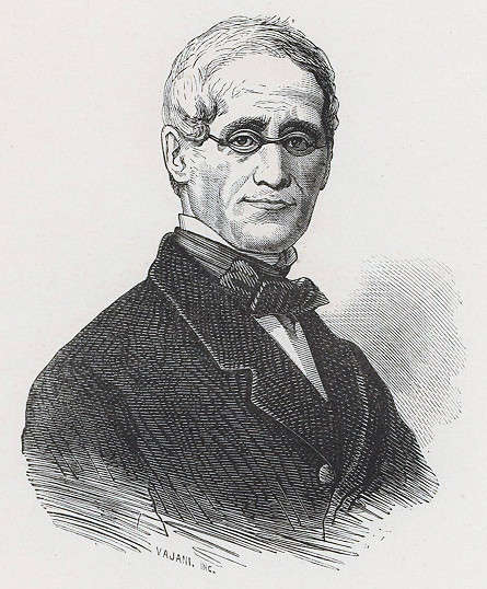 Ritratto di Giovanni Battista Nazari